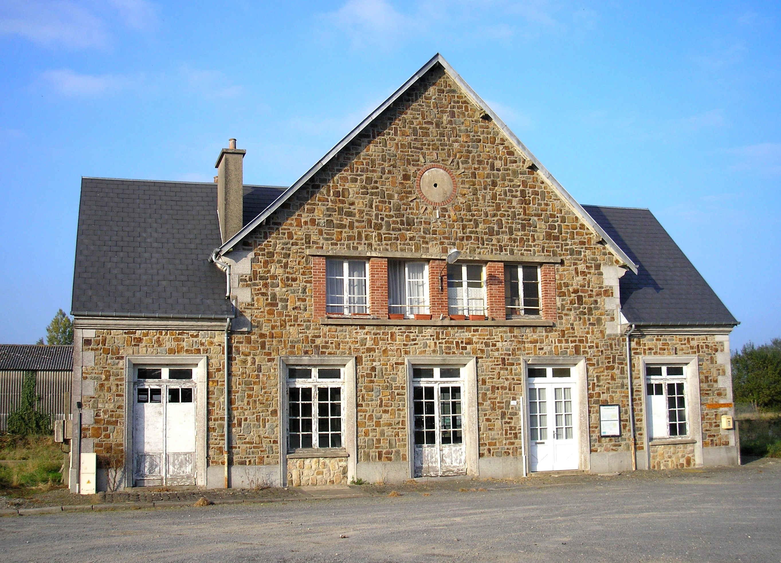 Saint-Sever-Calvados (Normandie, France) : La gare.